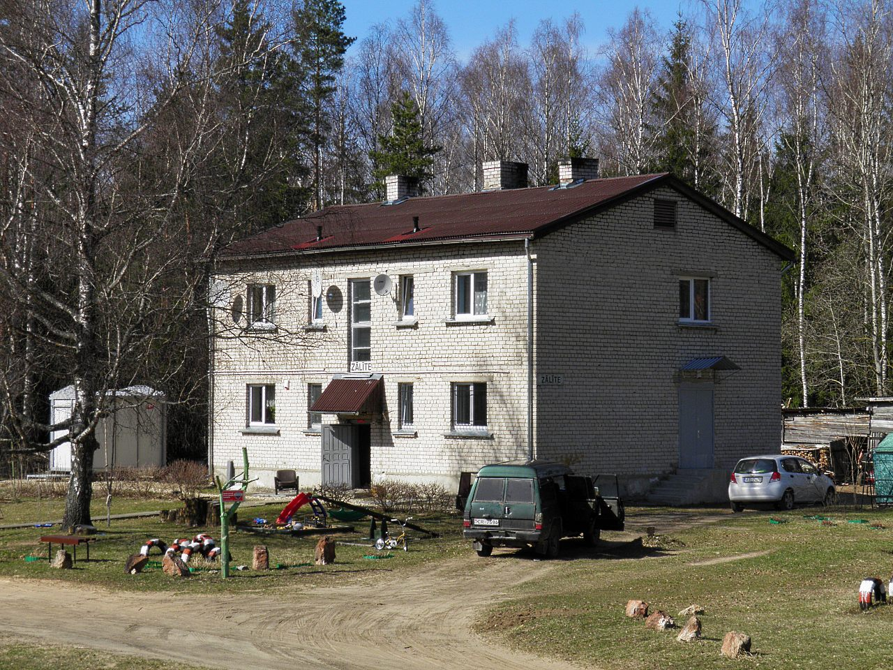 Здание вокзала станции ЗалитеLatviešu: Zālītes stacijas ēka